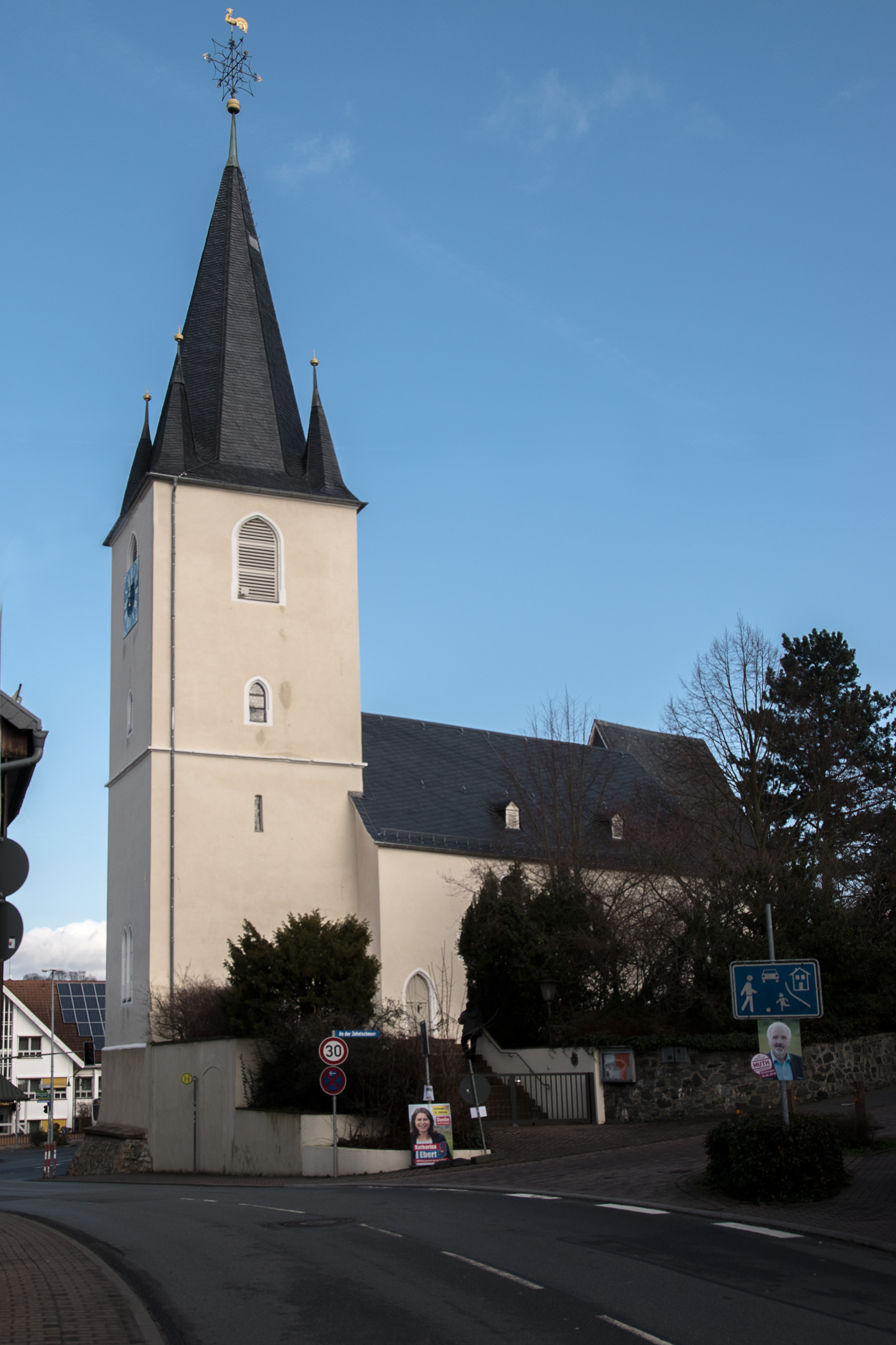 Denkmalgeschützte evangelische Kirche in Mühltal-Nieder Ramstadt, Kirchstraße 4